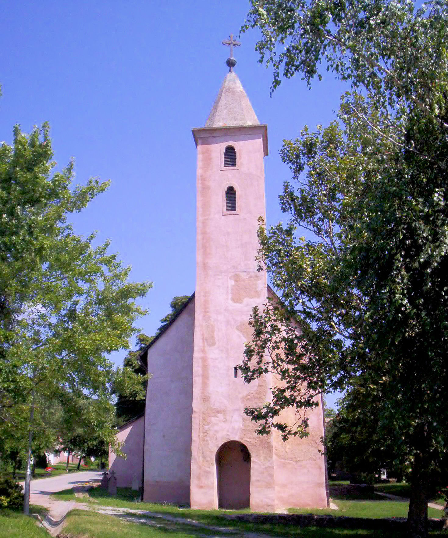 A cserkúti Árpád-kori templom